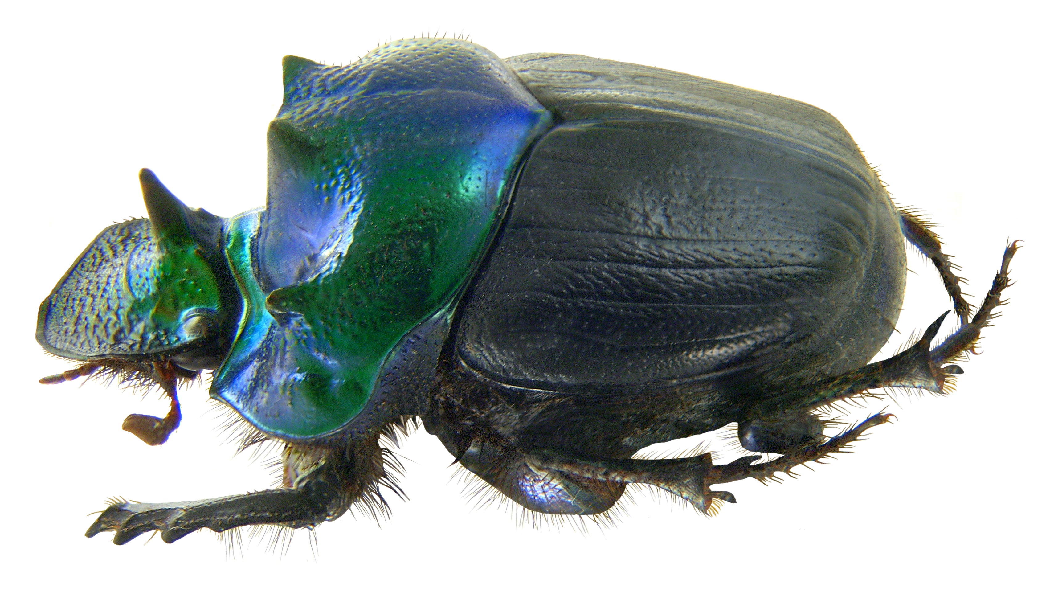 Familie: Scarabaeidae Grösse: 20 mm Fundort: Malawi, Dessous leg. 1983; det. U.Schmidt, 2006 Foto: U.Schmidt, 2009